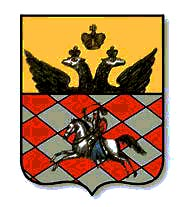 Велиж, герб города